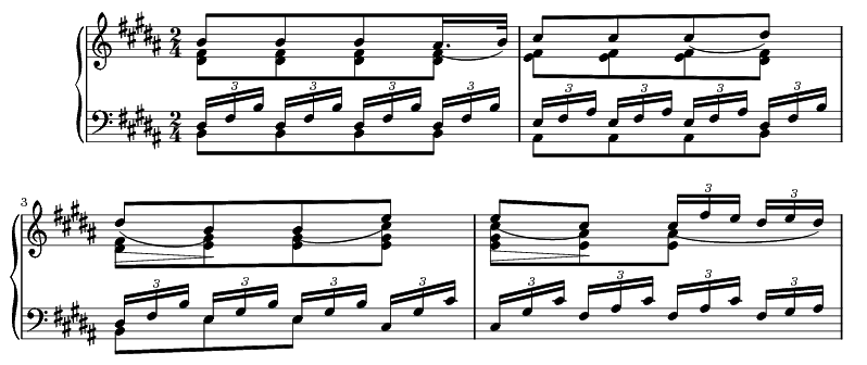 Tema principal de la fantasía op 77 de Beethoven